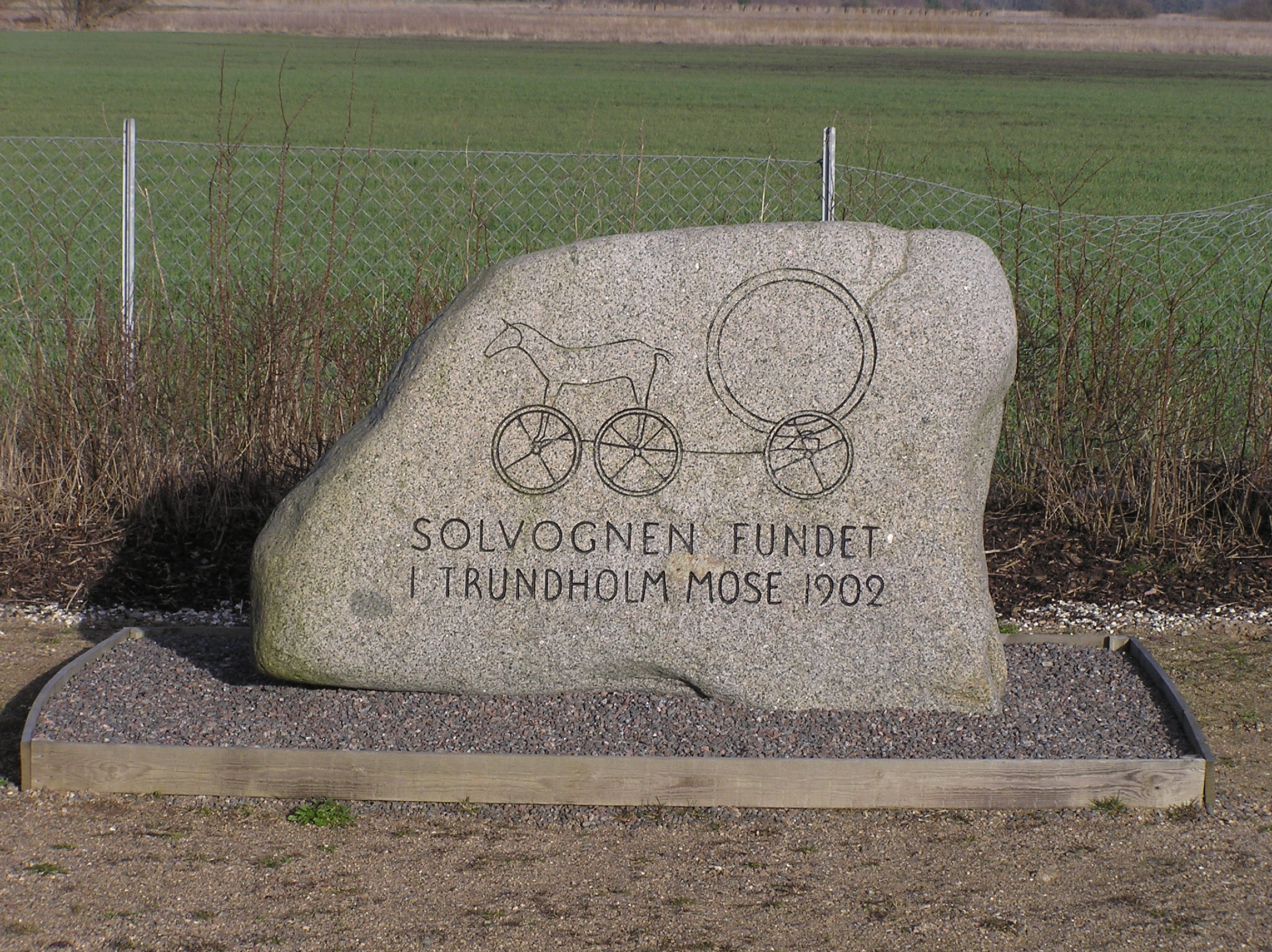 Danmark Sjælland Fundort des Sonnenwagen vonTrundholm